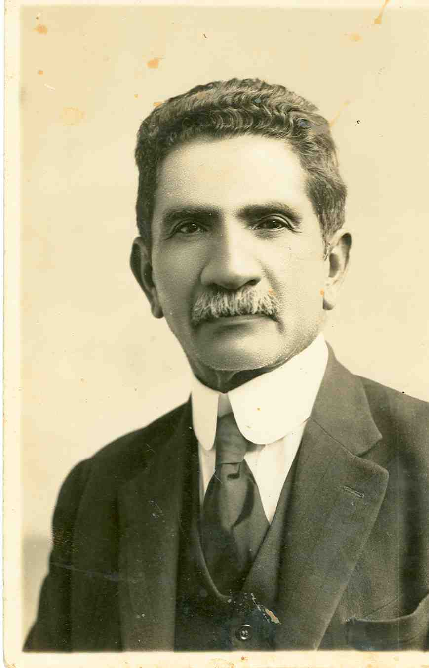 Miguel Obregón Lizano (1865-1935). Fundador de la Biblioteca Nacional de Costa Rica y las primeras bibliotecas públicas de este país. Benemérito de la Enseñanza en Costa Rica.